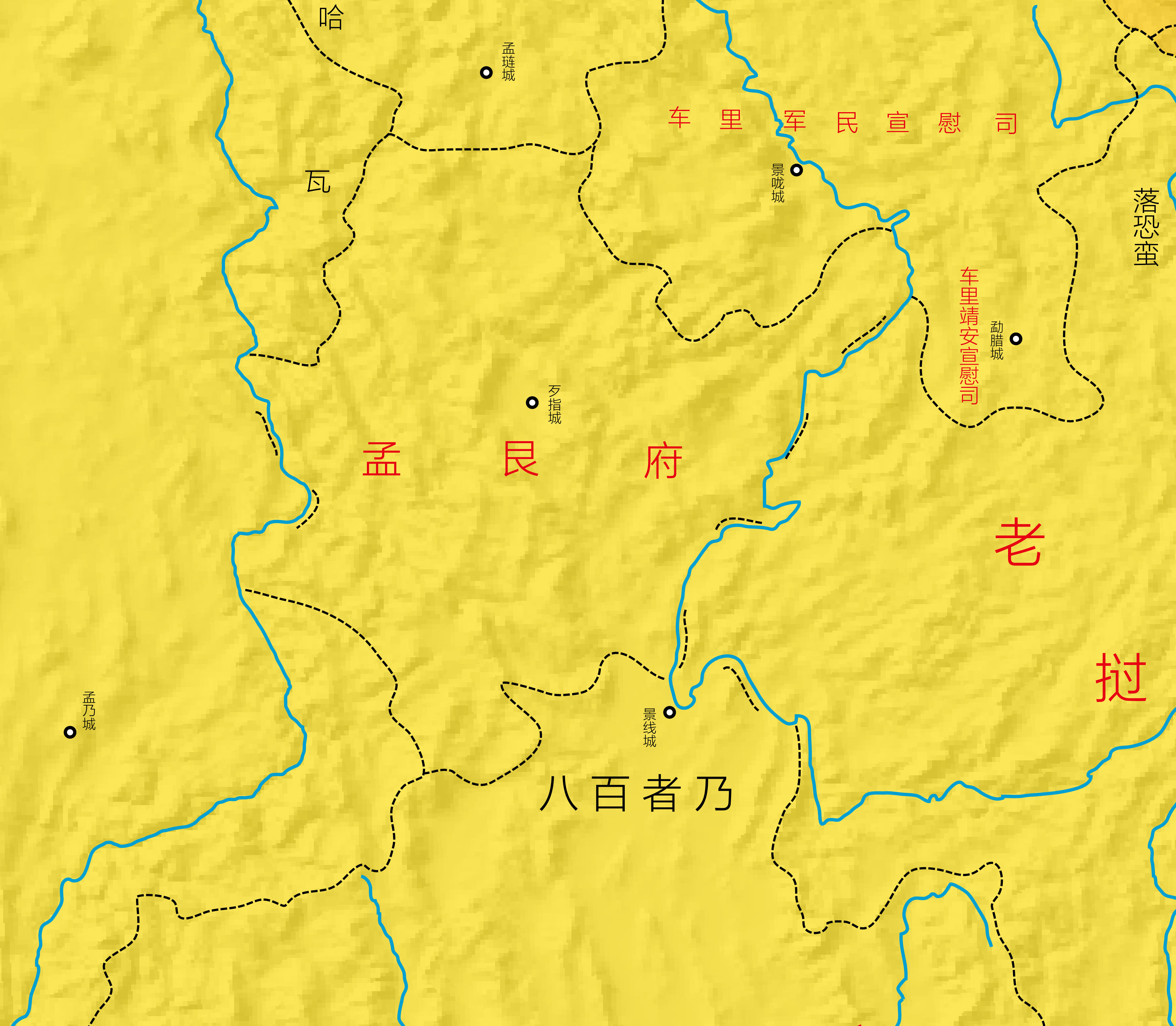 孟艮府地区